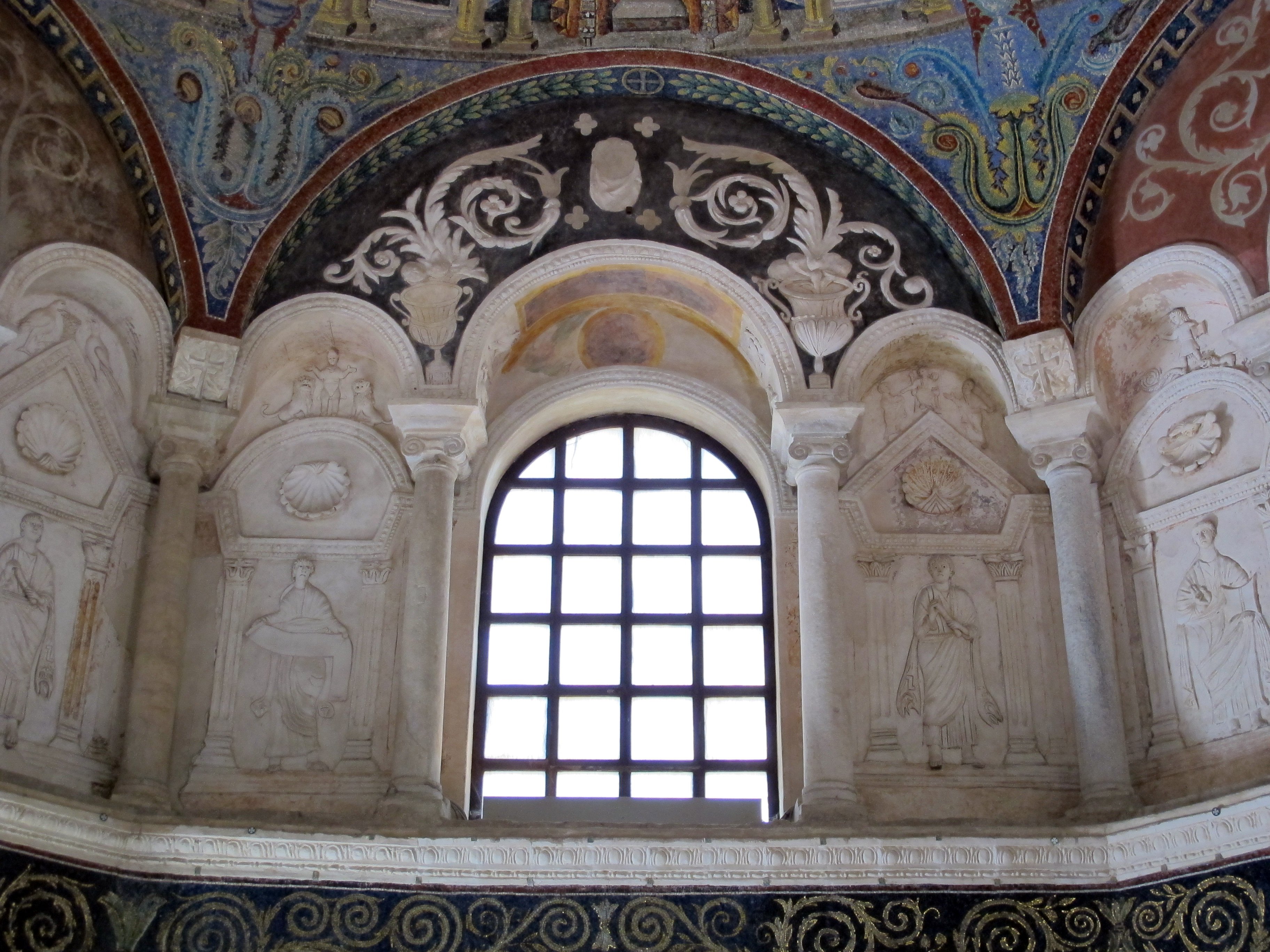 Battistero Neoniano - MIBAC This is a photo of a monument which is part of cultural heritage of Italy.